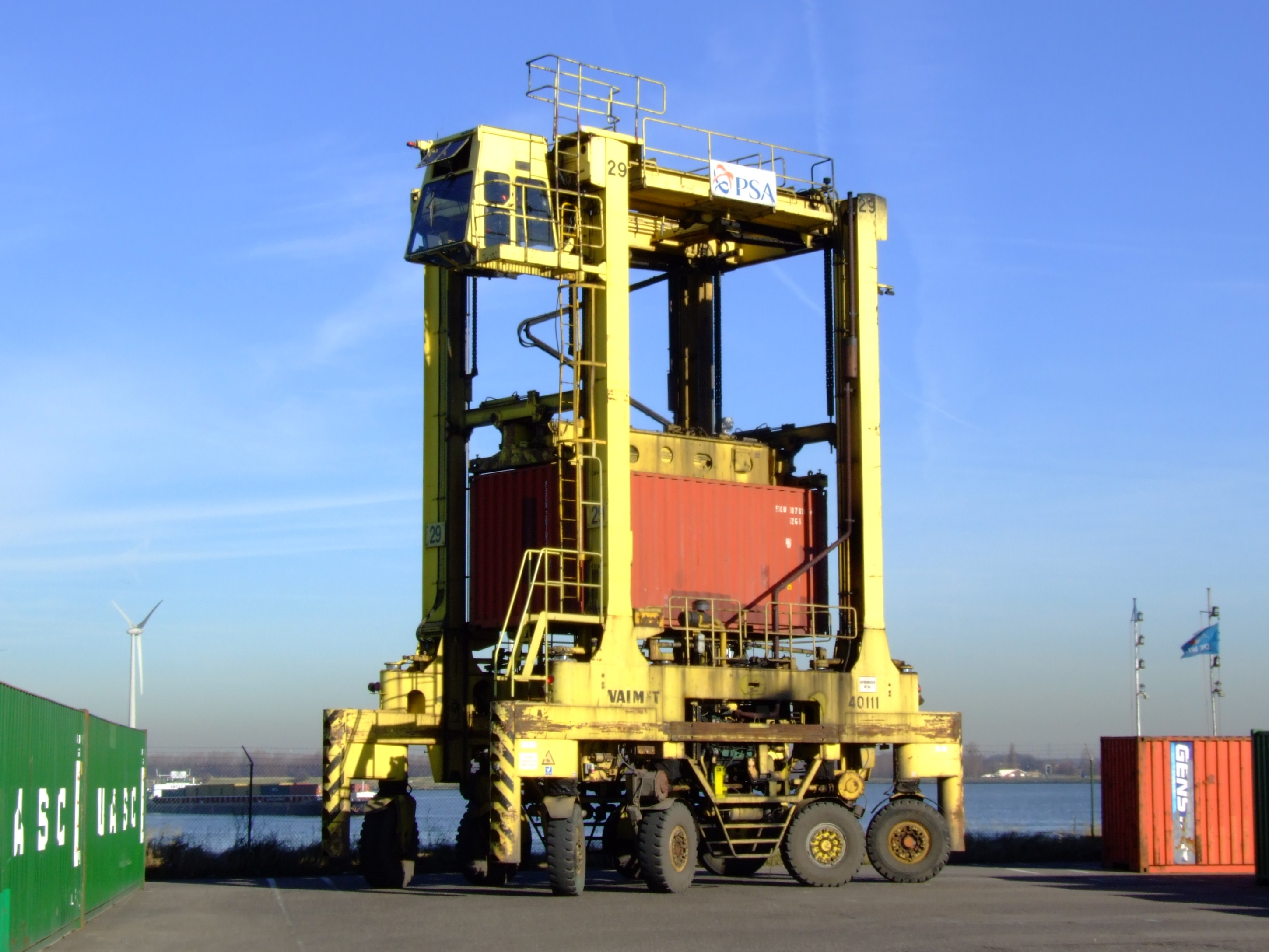 SISU Valmet 44011 Straddle carrier container mover.